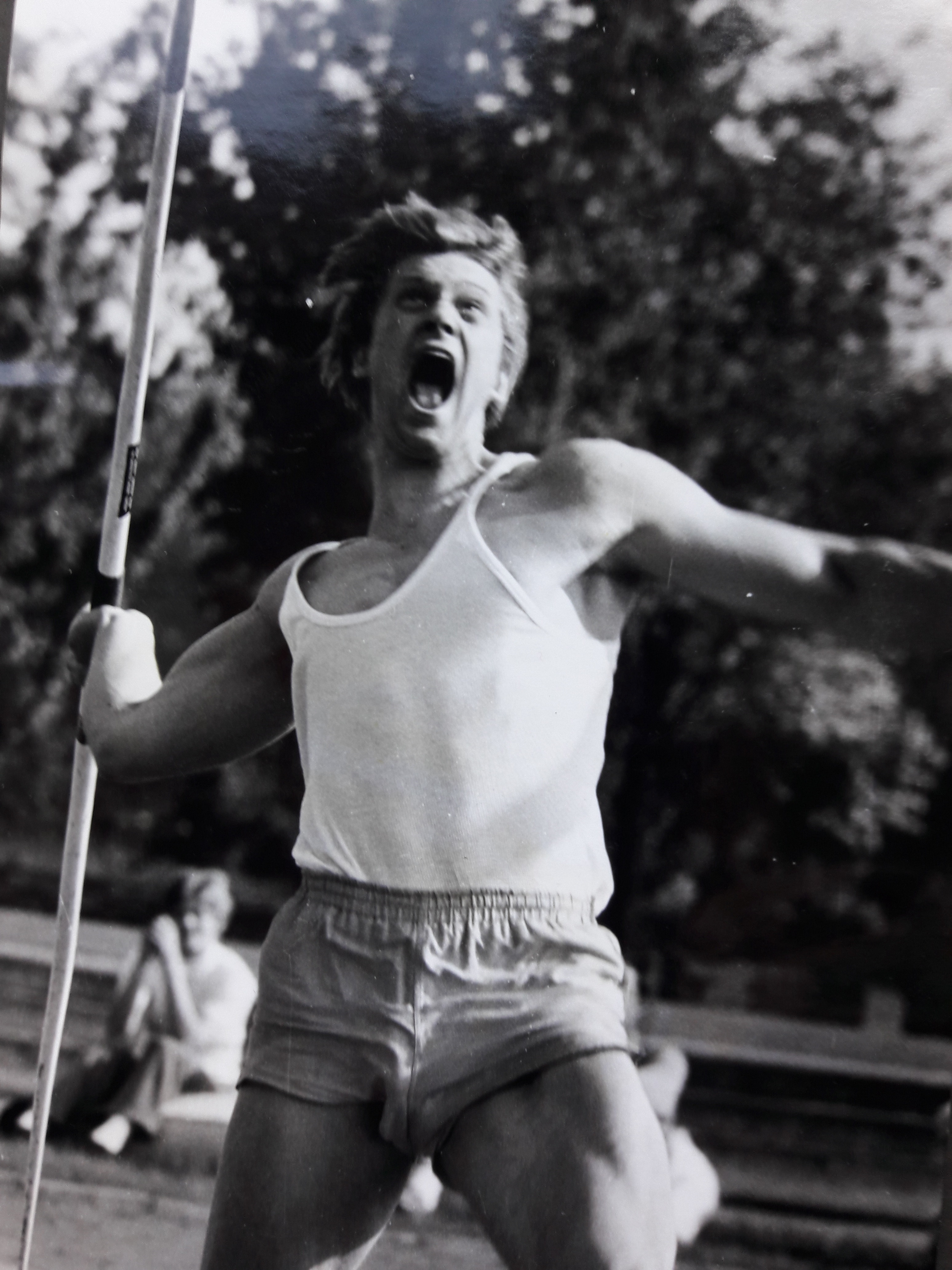 Foto des Speerwerfers Günter J. Glasauer im Jahr 1971 bei einem 78m-Wurf